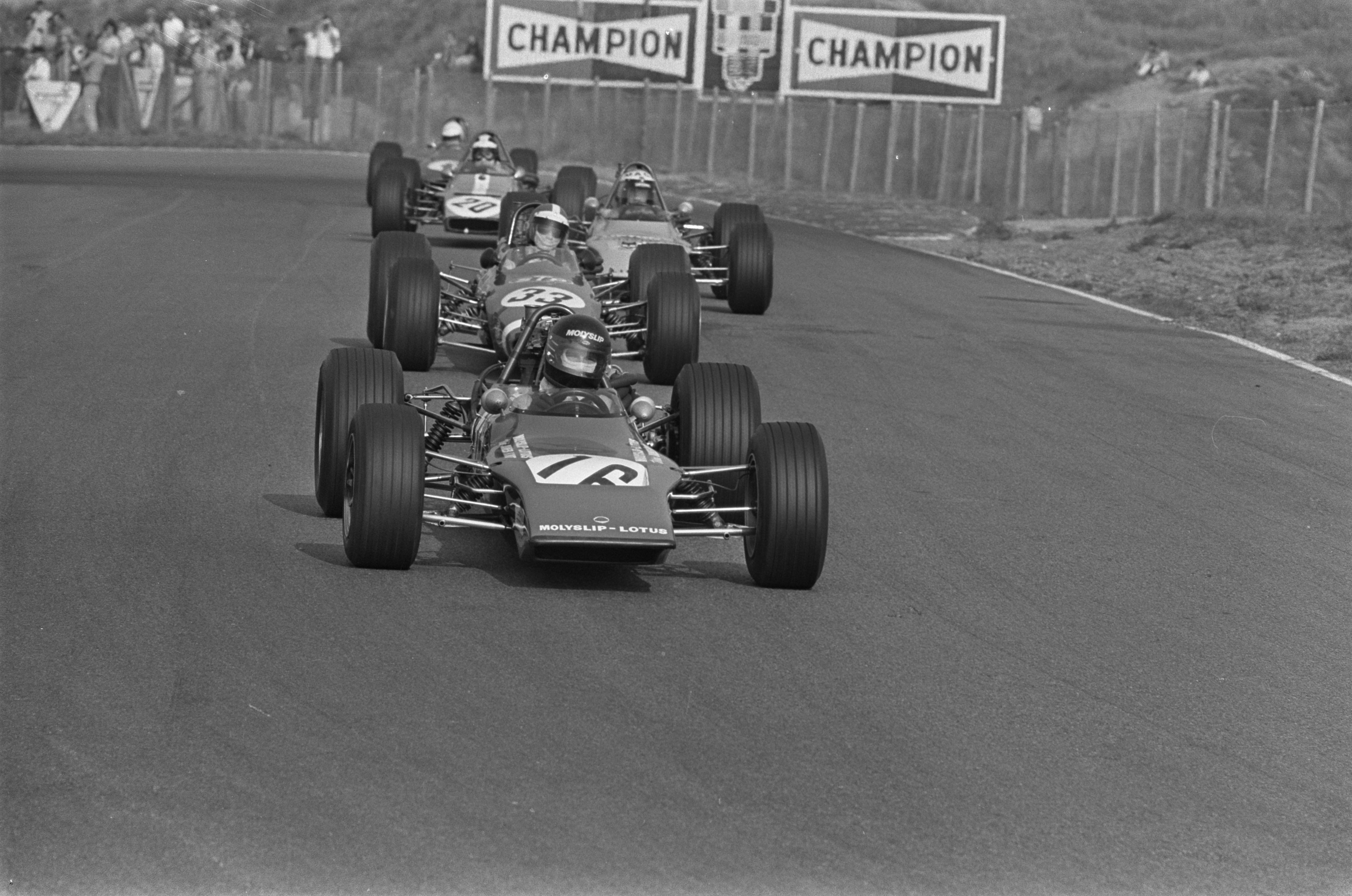 Collectie / Archief : Fotocollectie Anefo Reportage / Serie : [ onbekend ] Beschrijving : Autoraces op circuit Zandvoort, om Zandvoort Trophy; Formule III race , op kop nr. 16 Mames Hunt ; nr. 33 winnaar Jurg Dubler Datum : 30 augustus 1970 Locatie : Noord-Holland, Zandvoort Trefwoorden : AUTORACES Fotograaf : Evers, Joost / Anefo Auteursrechthebbende : Nationaal Archief Materiaalsoort : Negatief (zwart/wit) Nummer archiefinventaris : bekijk toegang 2.24.01.05 Bestanddeelnummer : 923-7926